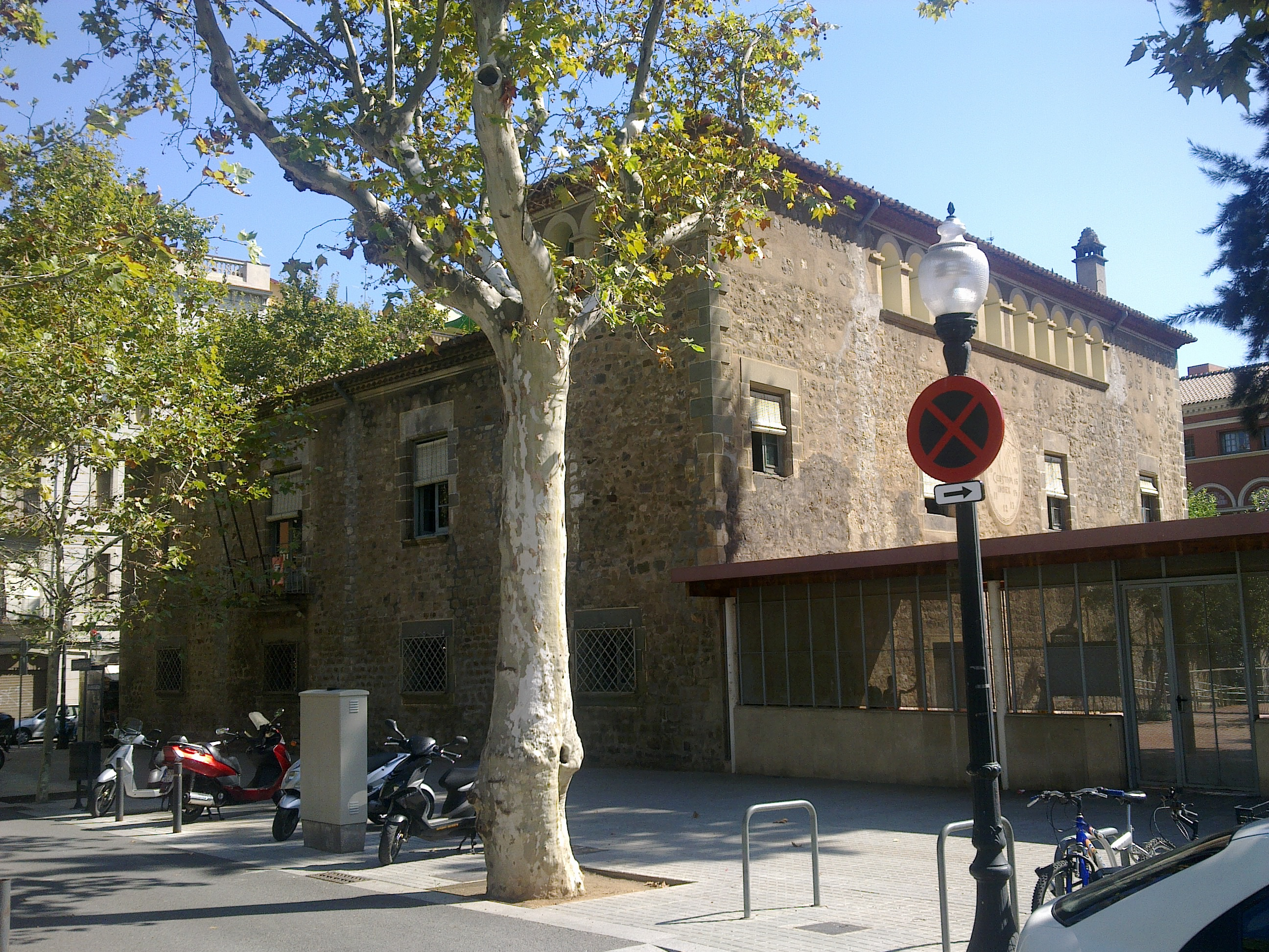 Plaça Valentí Almirall. Escola Casas. Torre Sant Joan Barcelona